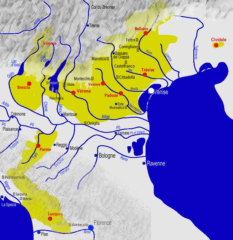 Territori controllati dalla Signoria veronese degli Scaligeri nel 1336, nel momento di massima espansione.